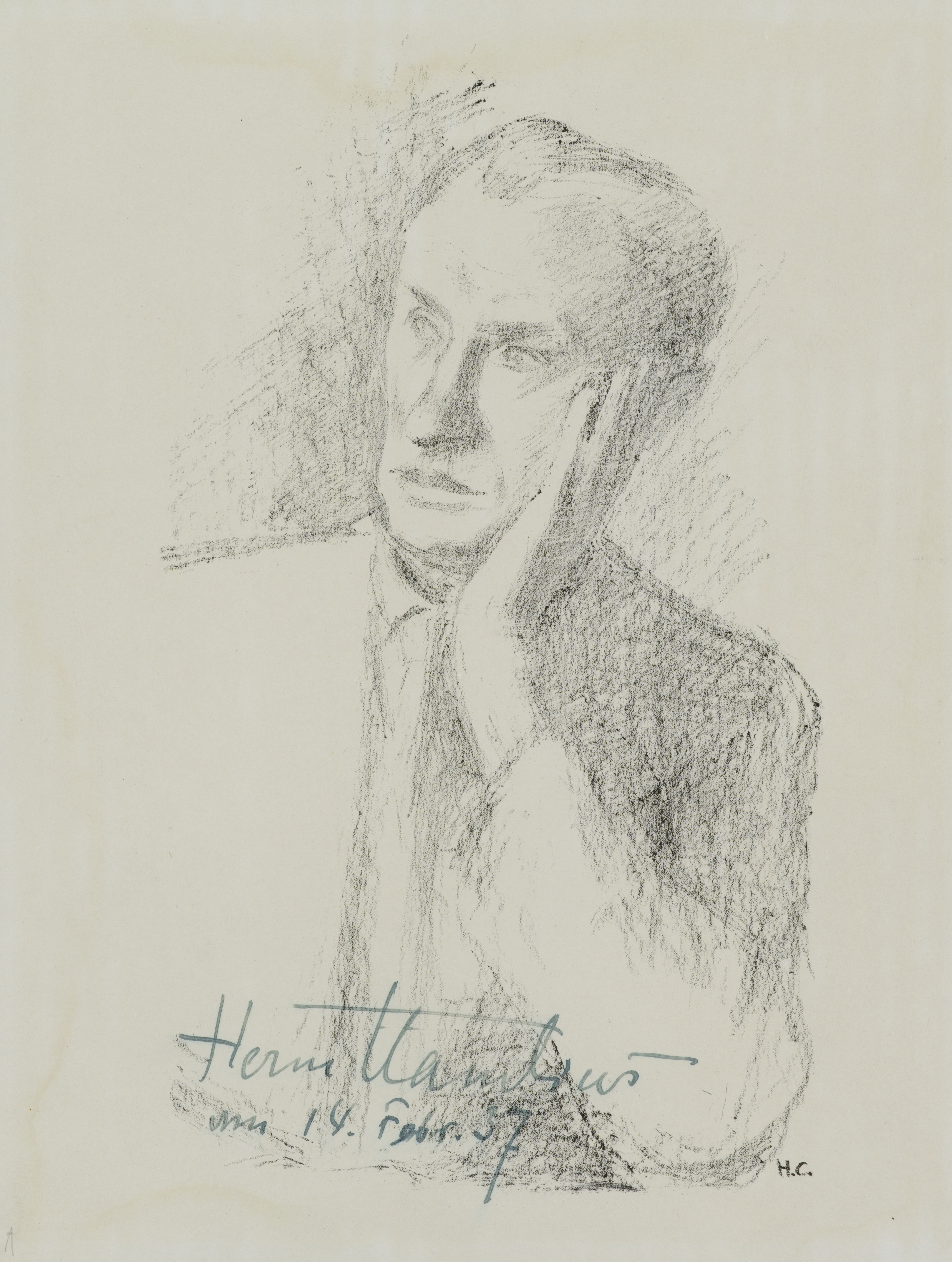 Bildnis von Hermann Claudius